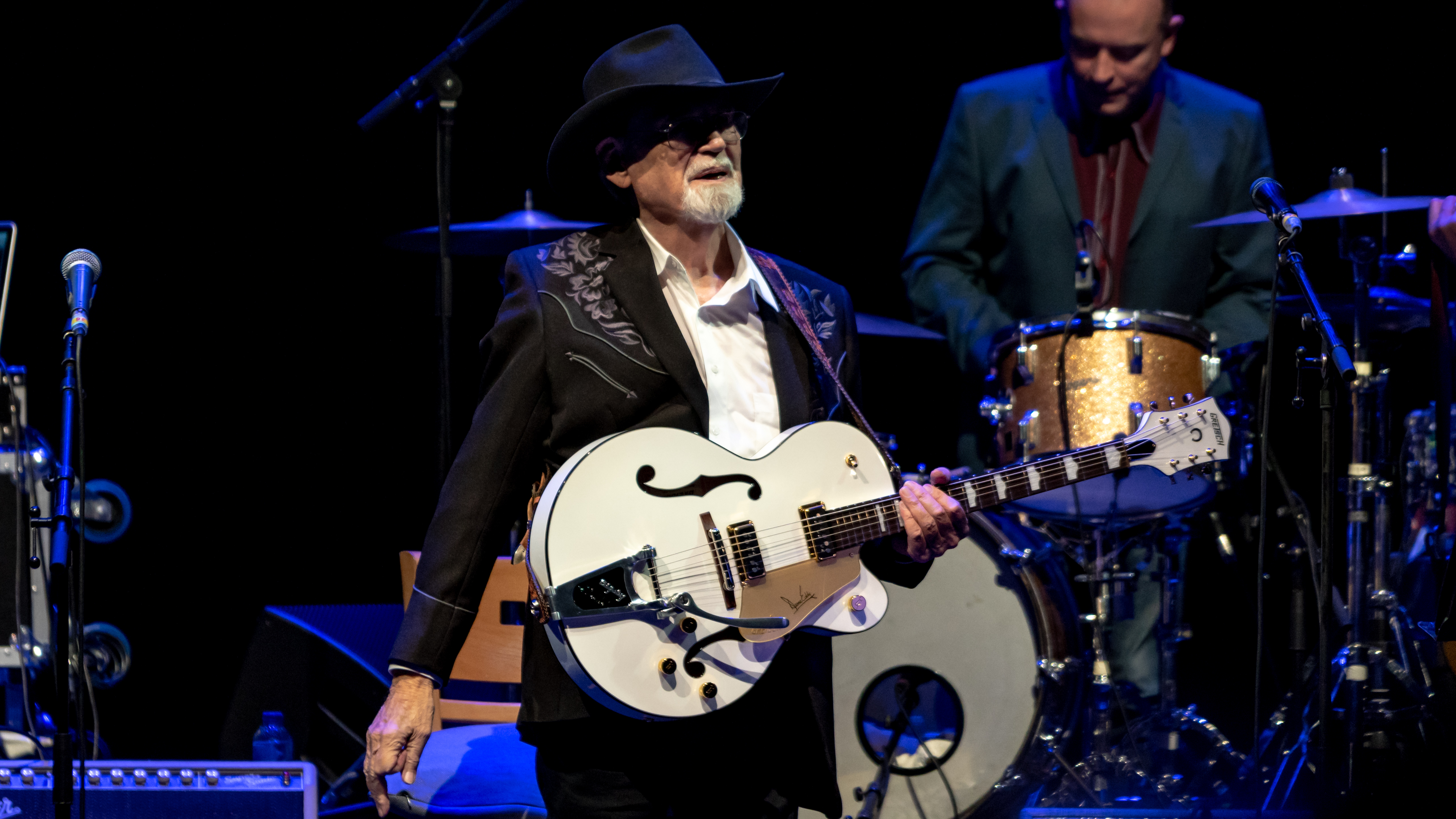 DuaneEddyPall231018-37